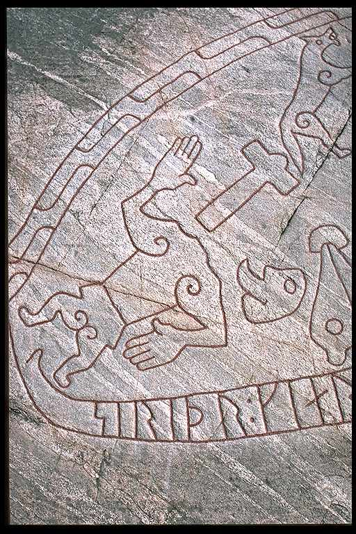 Detalj av Ramsundsristningen: smeden Regin med avhugget huvud. Motiv: Sö101 Jäder, Ramsundsdsristningen Nyckelord: Riksintressen, Runor Kategori: Hällristning, Runristning/runsten Detalj av Ramsundsristningen: smeden Regin med avhugget huvud. Sö101 Jäder, Ramsundsdsristningen.